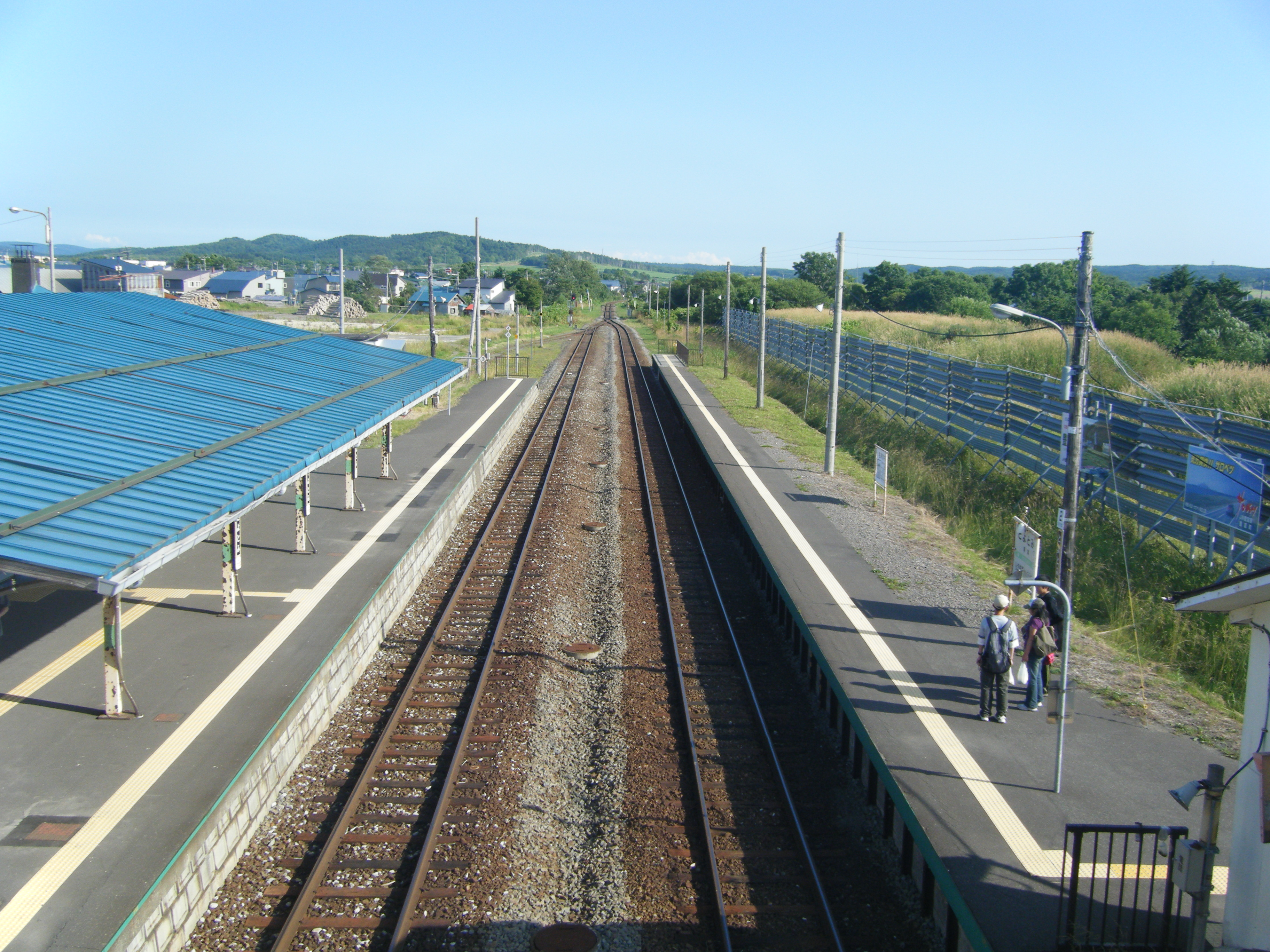 JR北海道 宗谷本線 豊富駅ホーム俯瞰。